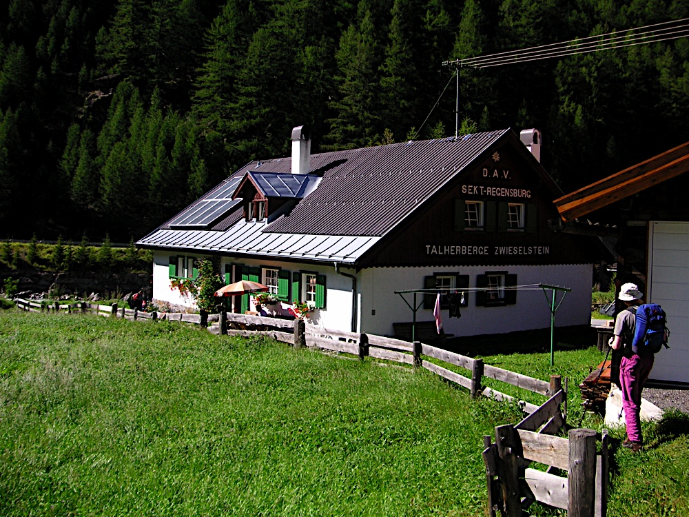 Talherberge Zwieselstein am Fernwanderweg E5.